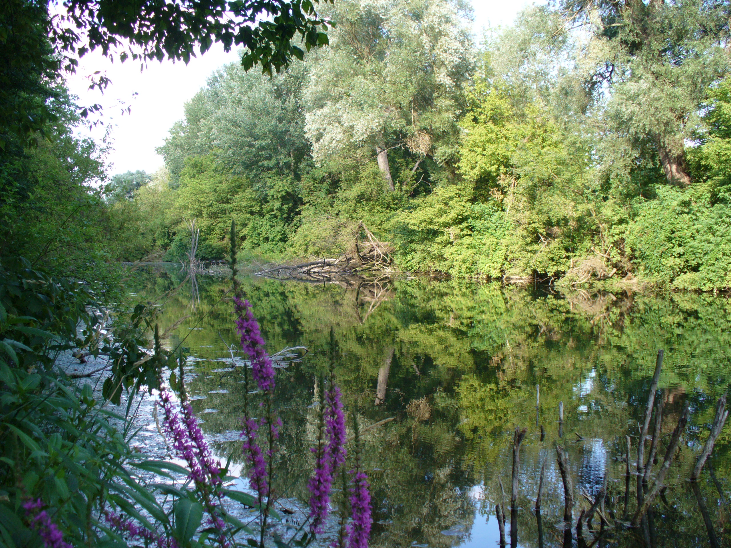 Dunajské luhy floodplains near Bratislava's borough Podunajské Biskupice and the Senec District, Slovakia